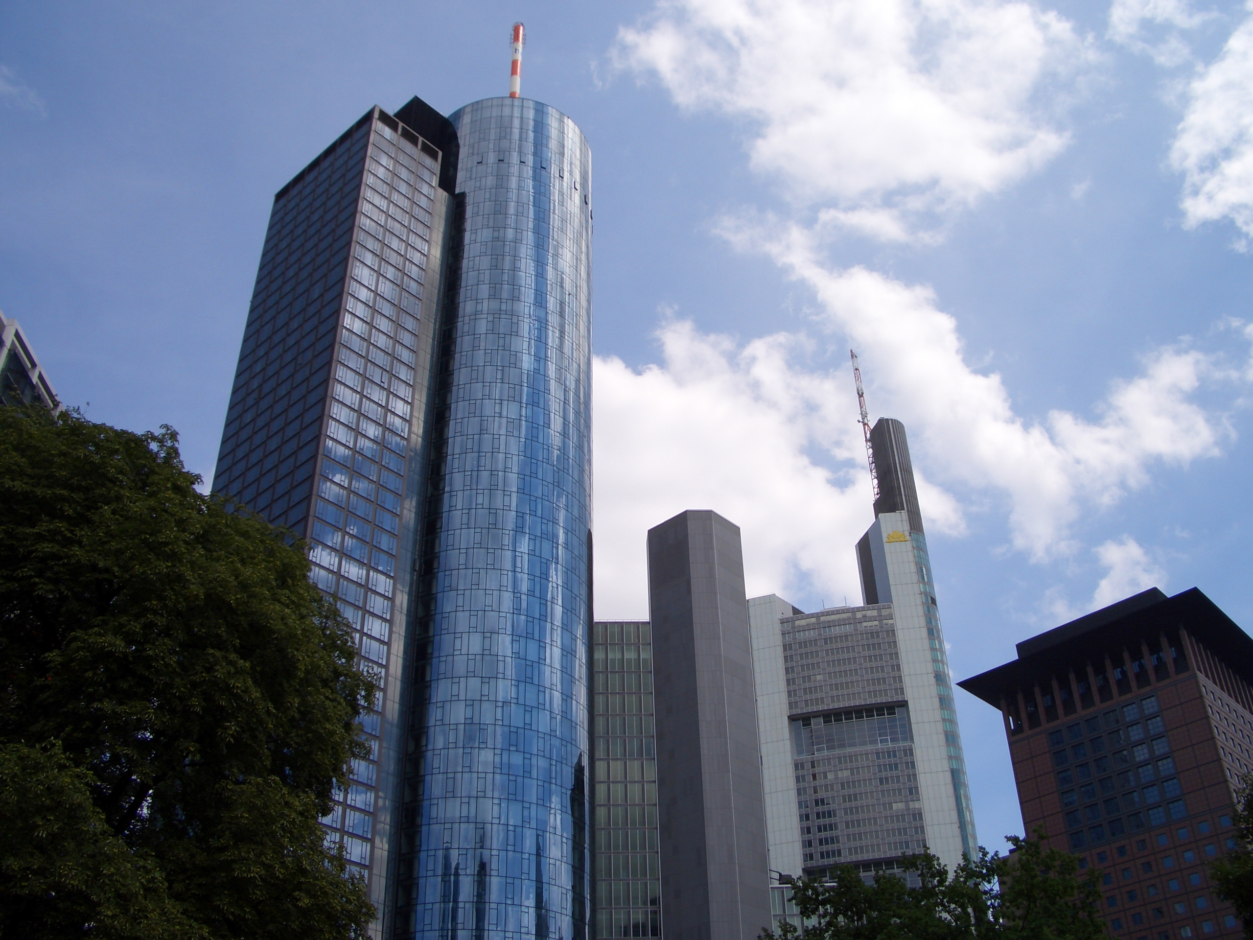 Maintower, von der Taunusanlage gesehen, Maintower, view from Taunusanlage